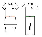 Uniforme del Colegio Dante Alighieri de Asunción, Paraguay.